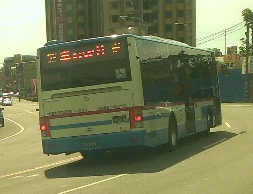 苗栗客運2015年金旅XML6125J15C大客車628-FY車尾，行駛於苗栗縣頭份市中正一路。